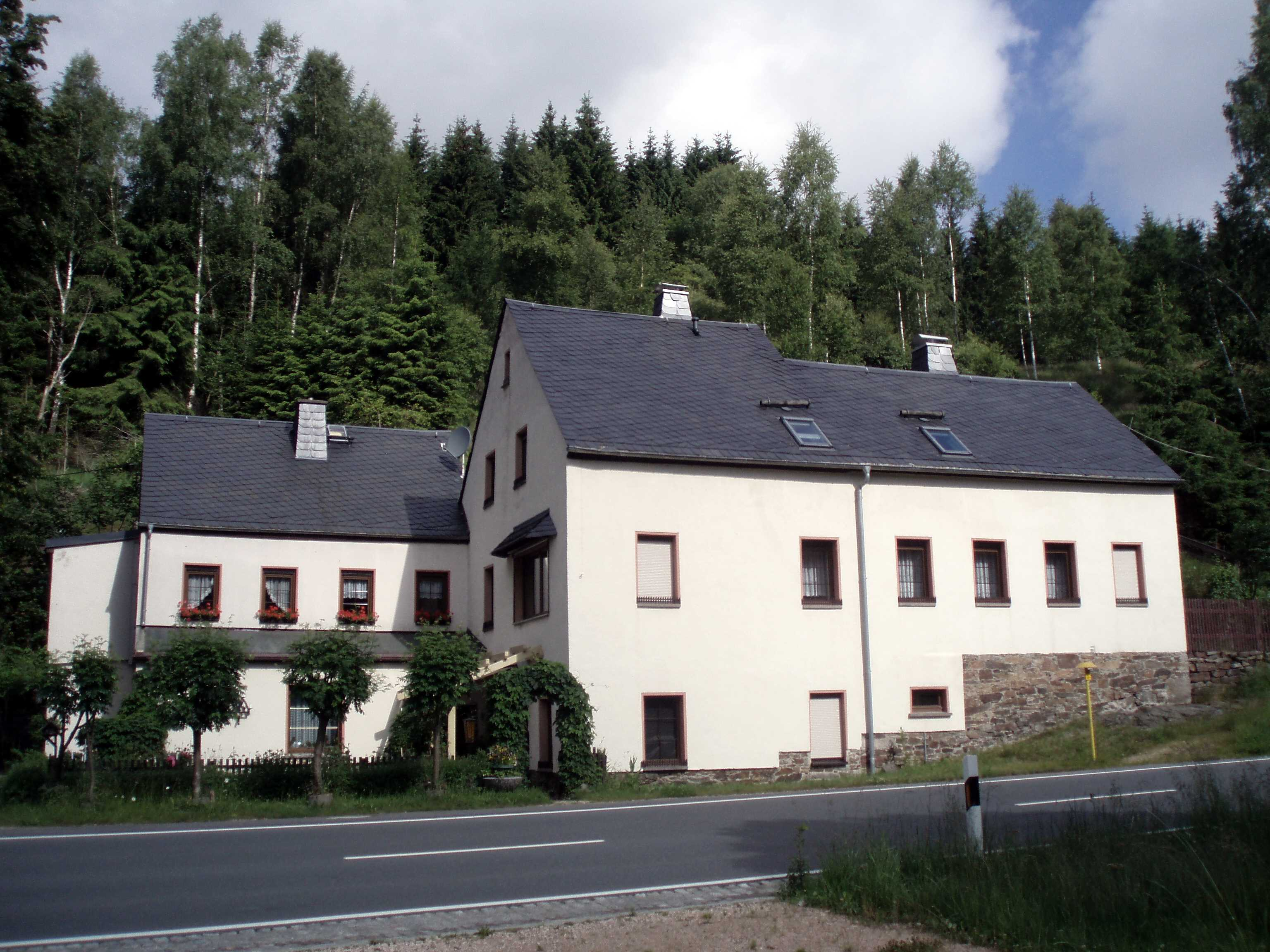 Früheres Huthaus des Glück-Auf-Stolln in Johanngeorgenstadt